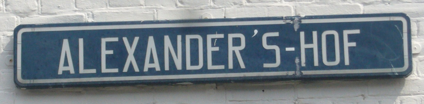 Alexander's-hof in Den Haag, naambordje